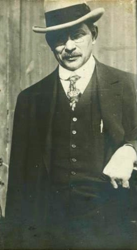 Россия. Владелец московского завода "Дукс" Юлий Меллер. 1914г.